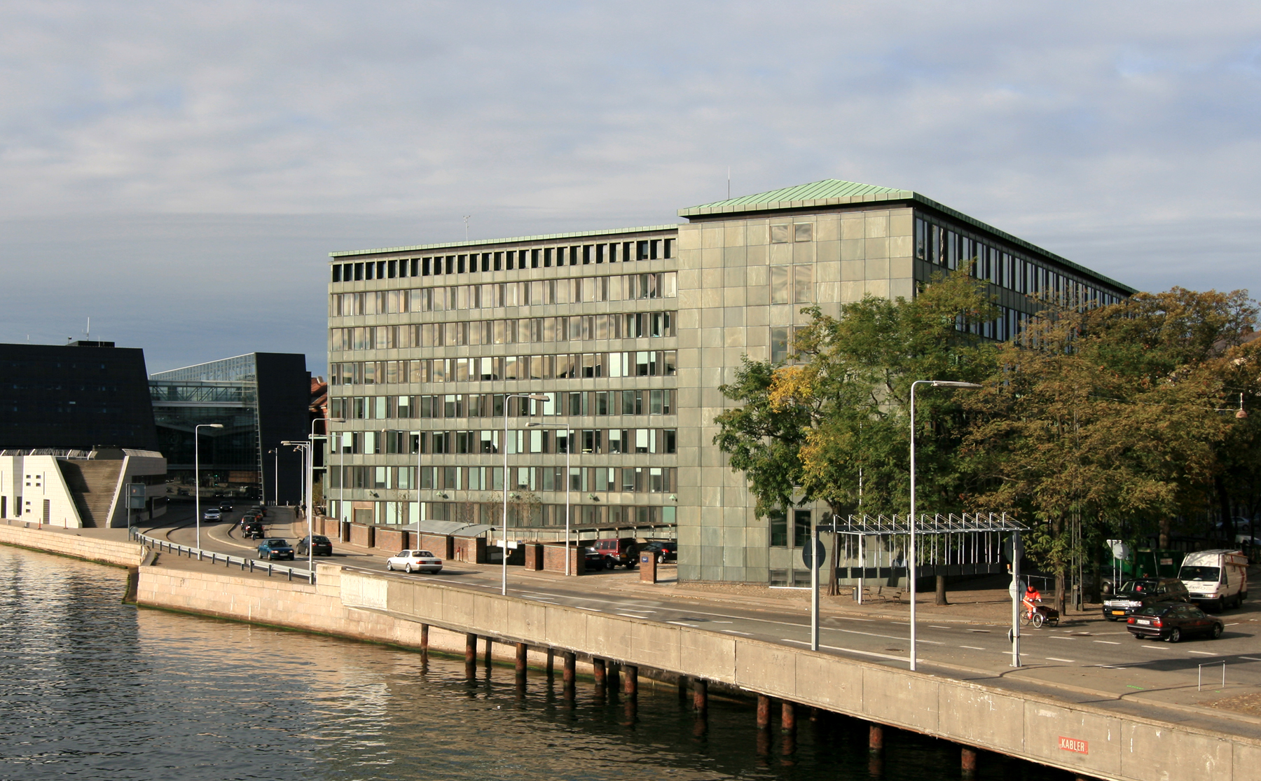 Ministerialbygningen, København.